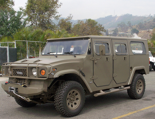 vehículo tiuna de venezuela